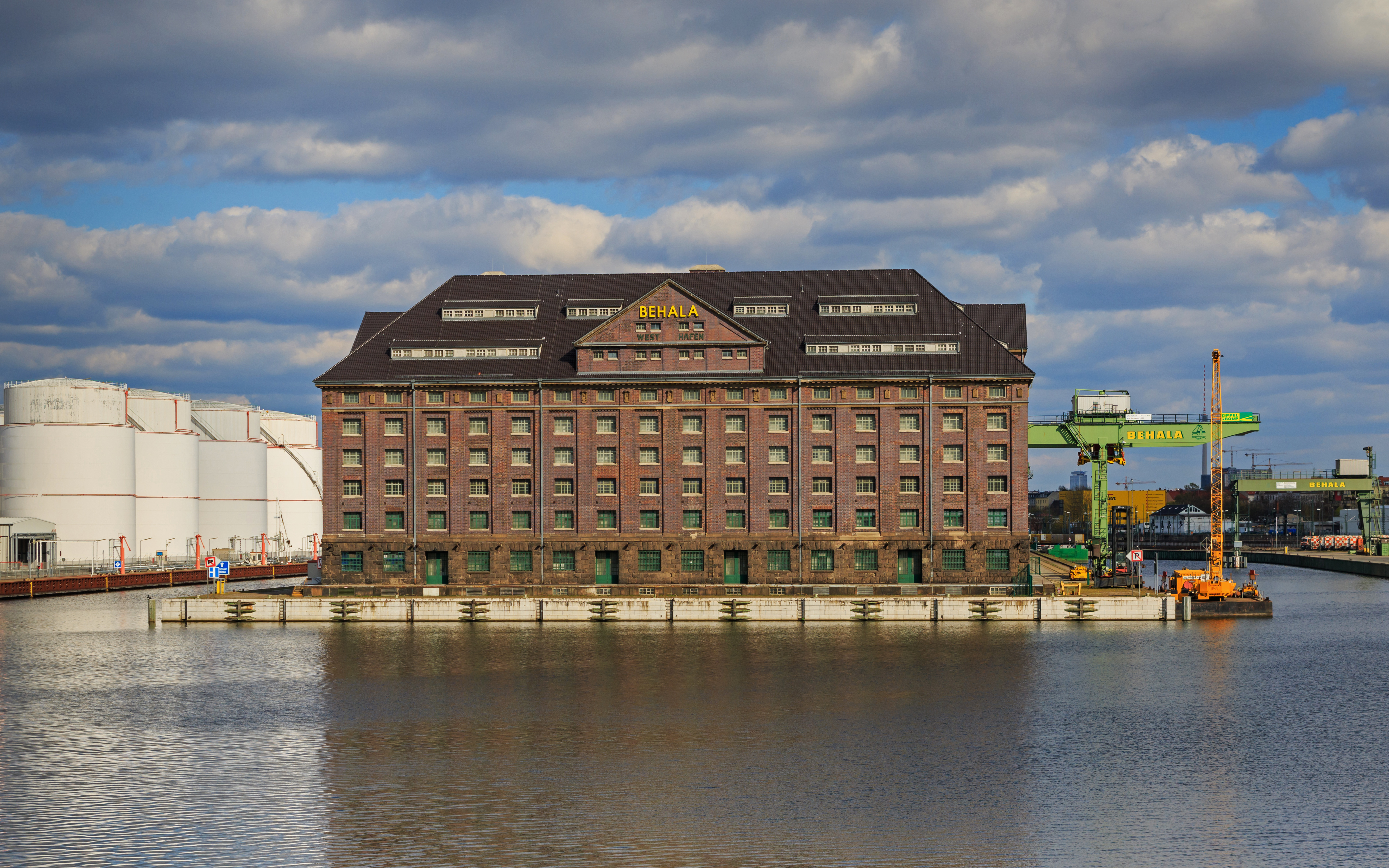 BEHALA Westhafen Berlin: Aussicht von der Beusselstraße